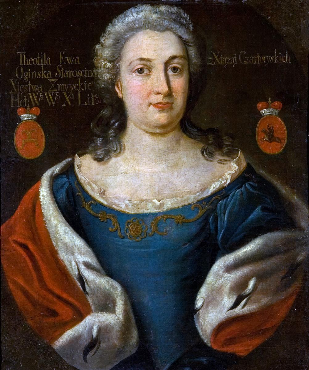 Беларуская (тарашкевіца): Партрэт Тэафіліі Эвы Агінскай (Teafilija Eva Aginskaja) з князёў Чартарыйскіх (Čartaryjski)